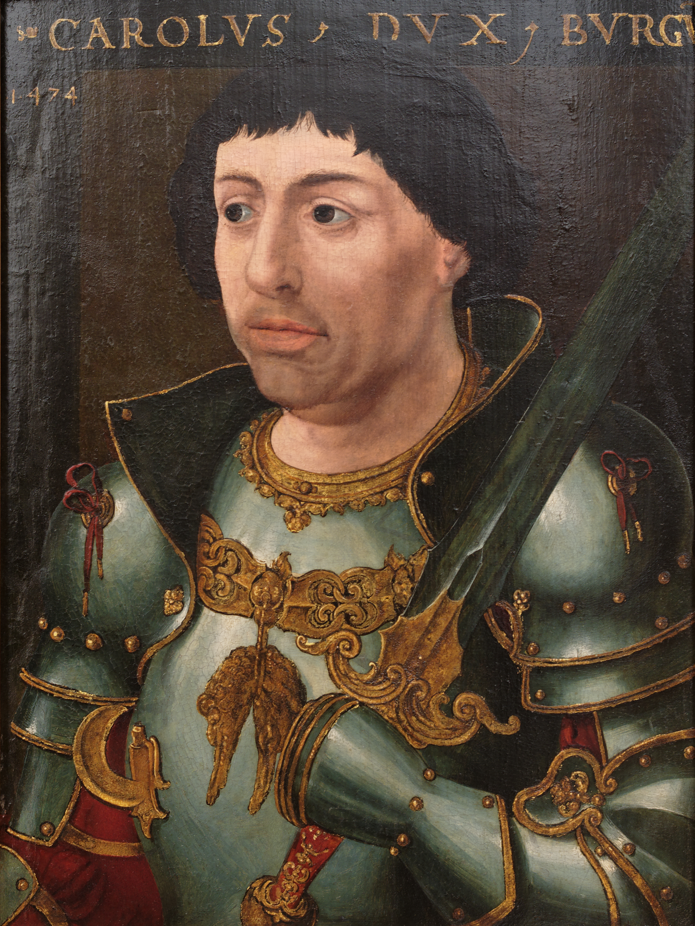 Copie de la moitié du XVIe siècle d'après un original de 1474 (?). Le portrait porte la date de 1474, année où, accompagnant à la chartreuse de Champmol les corps de ses parents défunts, Charles le Téméraire fit à Dijon sa "joyeuse entrée", vêtu d'une armure splendide. Sa visite fut marquée par de grandes festivités, et le duc prononça des discours où il manifestait sa volonté de devenir roi. Un portrait peut-être été réalisé à cette occasion. Ce panneau, qu'une étude du support de bois a permis de dater de la moitié du XVIe siècle, en serait la copie